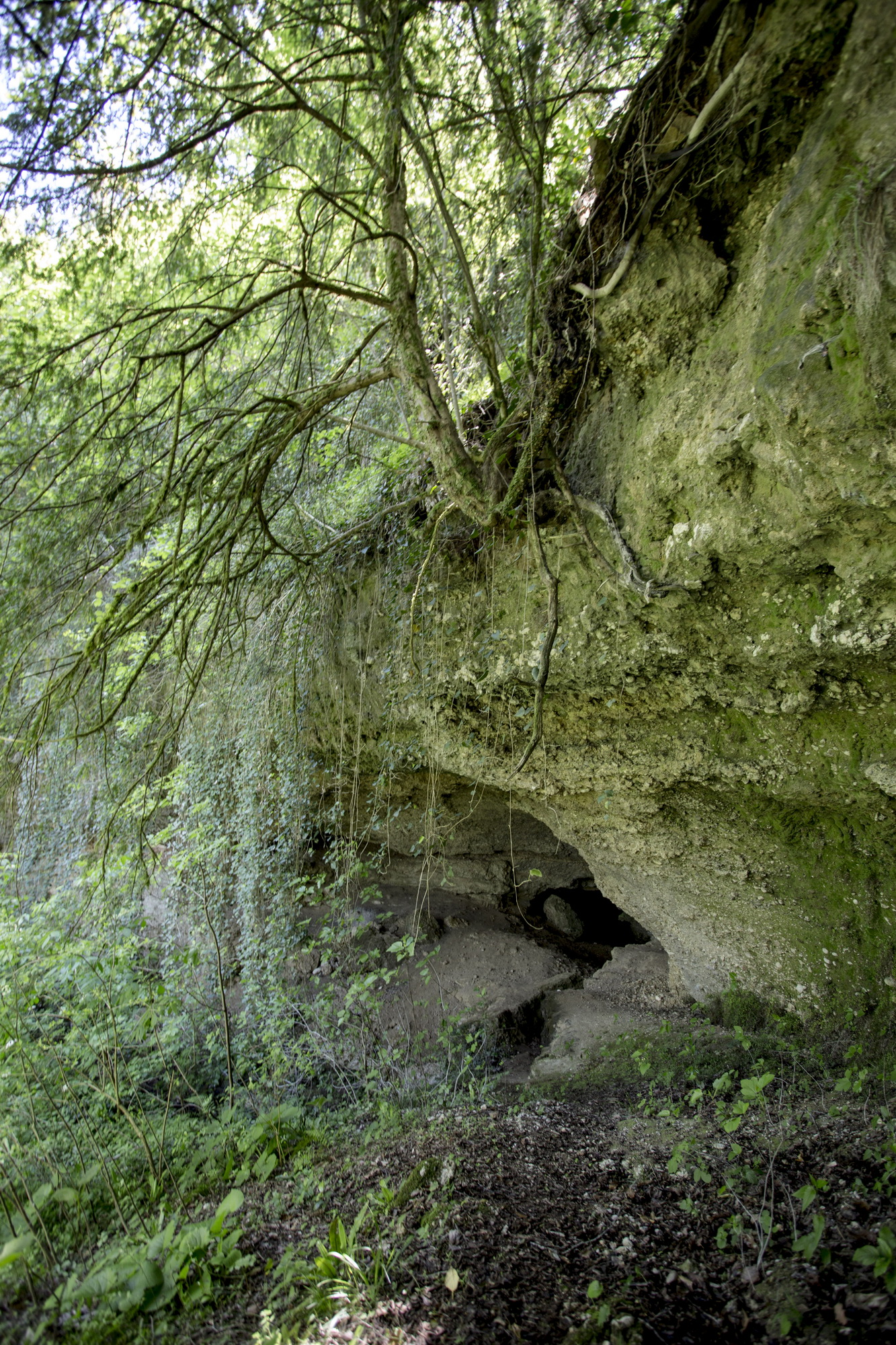 ნაზოდელავოს მღვიმის ბუნების ძეგლი ღირშესანიშნაობა: ბუნების ძეგლი საქართველოში თავისი პარამეტრებით ერთ-ერთი გამორჩეული, მეოტურ კონგლომერატებში გამომუშავებული უდიდესი კლასტოკარსტული და ფსედოკარსტული 600 მ სიგრძის მღვიმეა. მღვიმე იხსნება შესასვლელი დარბაზით, რომელიც წარმოადგენს სუბჰორიზონტული განტოტვილი ტალანის (გვირაბის) ბოლო ნაწილს. მთავარი ტალანის ფსკერში ჩაჭრილი ეროზიული კანიონით მოზრდილი ცივი მიწისქვეშა მდინარე გაედინება. კანიონის სიღრმე ზოგან 7-8 მეტრს აღწევს. მთავარ ტალანს გამოეყოფა ორი შტო, რომლებიც მასთან შედარებით უფრო ვიწრო და მოკლეა. ერთ-ერთი ტალანი გამჭოლია და ზემო ბოლოთი სამზეოზე გადის. მღვიმესა და მის მიმდებარე ტერიტორიაზე ზაფხულობით გვხვდება ხელფრთიანები. მდებარეობა: ჩხოროწყუს მუნიციპალიტეტი, სოფ. ახუთის(ლემამფორე) მიდამოები, მდ. ზანას ხეობა, 290 მეტრი ზღვის დონიდან. კოორდინატები: N42 30.365 E42 13.272